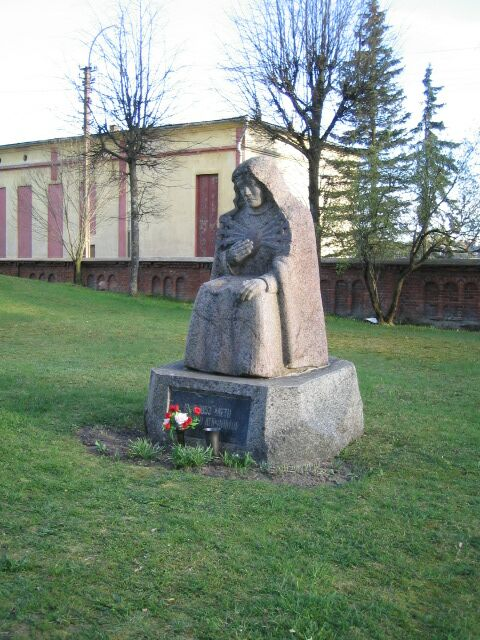 Paminklas tremtiniams.